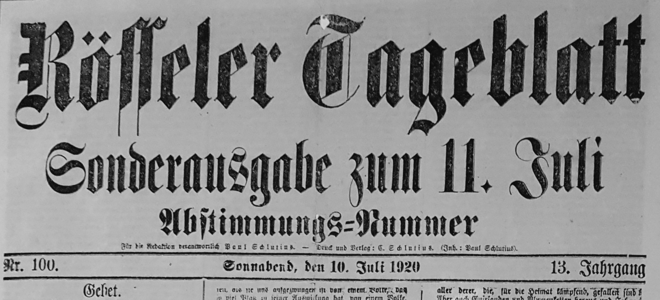 Titelkopf des Rösseler Tageblatts in Rößel, jetzt Reszel. Sonderausgabe vom 10. Juli 1920 zur Volksabstimmung am 11. Juli 1920 im Gefolge des Versailler Vertrags im Abstimmungsgebiet Allenstein